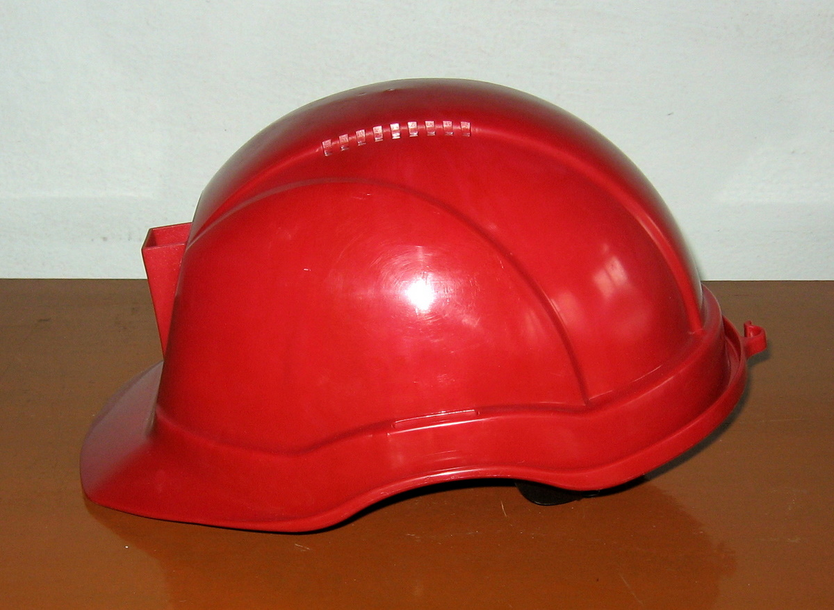 Шахтарська каска